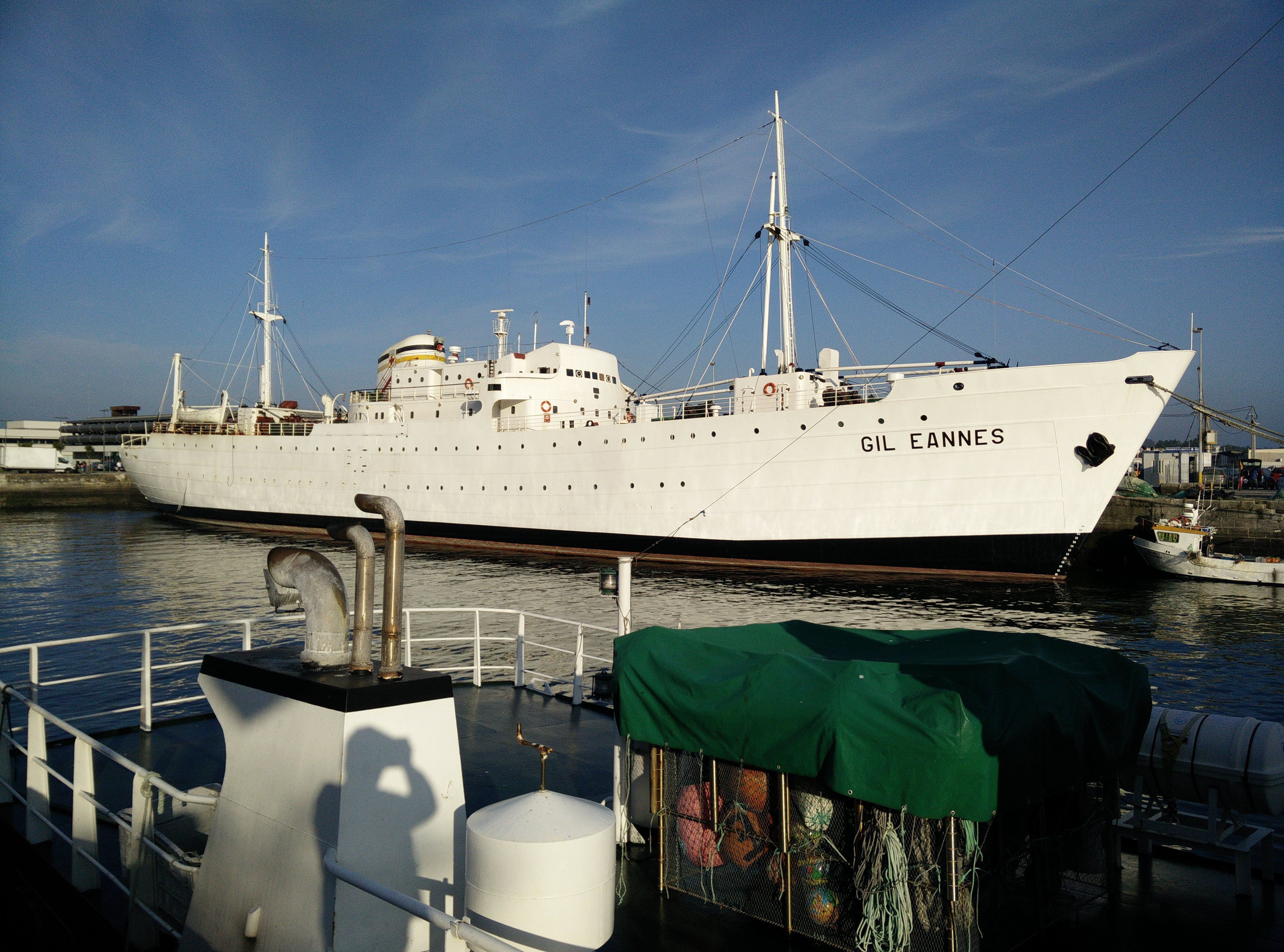 Navio Gil Eannes